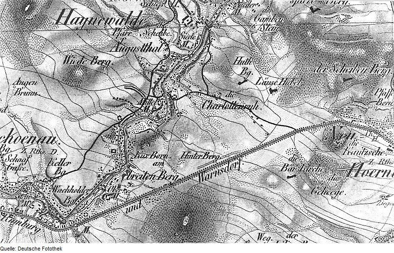 Original image description from the Deutsche Fotothek Hainewalde. Oberreit, Sect. Zittau, 1844/46